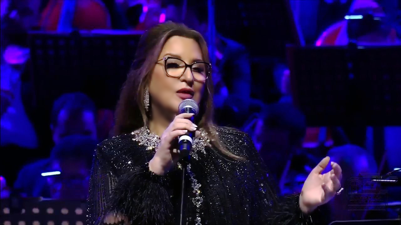 المطربة عزيزة جلال بمهرجان شتاء طنطورة مسرح مرايا بالعلا السعودية 26 ديسمبر 2019